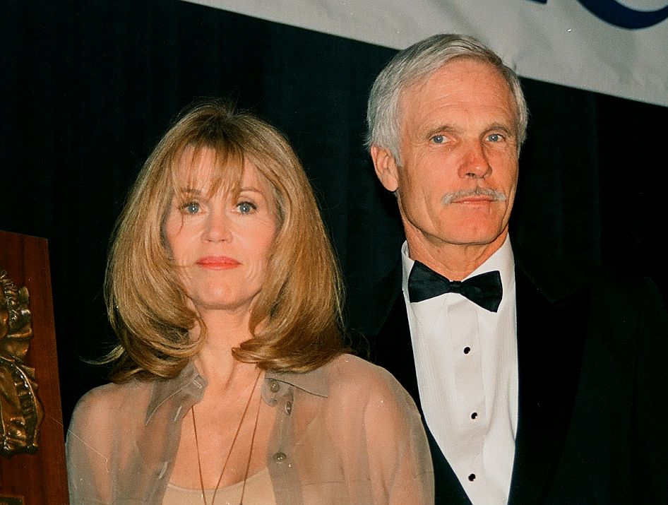 Wash D.C. 2002